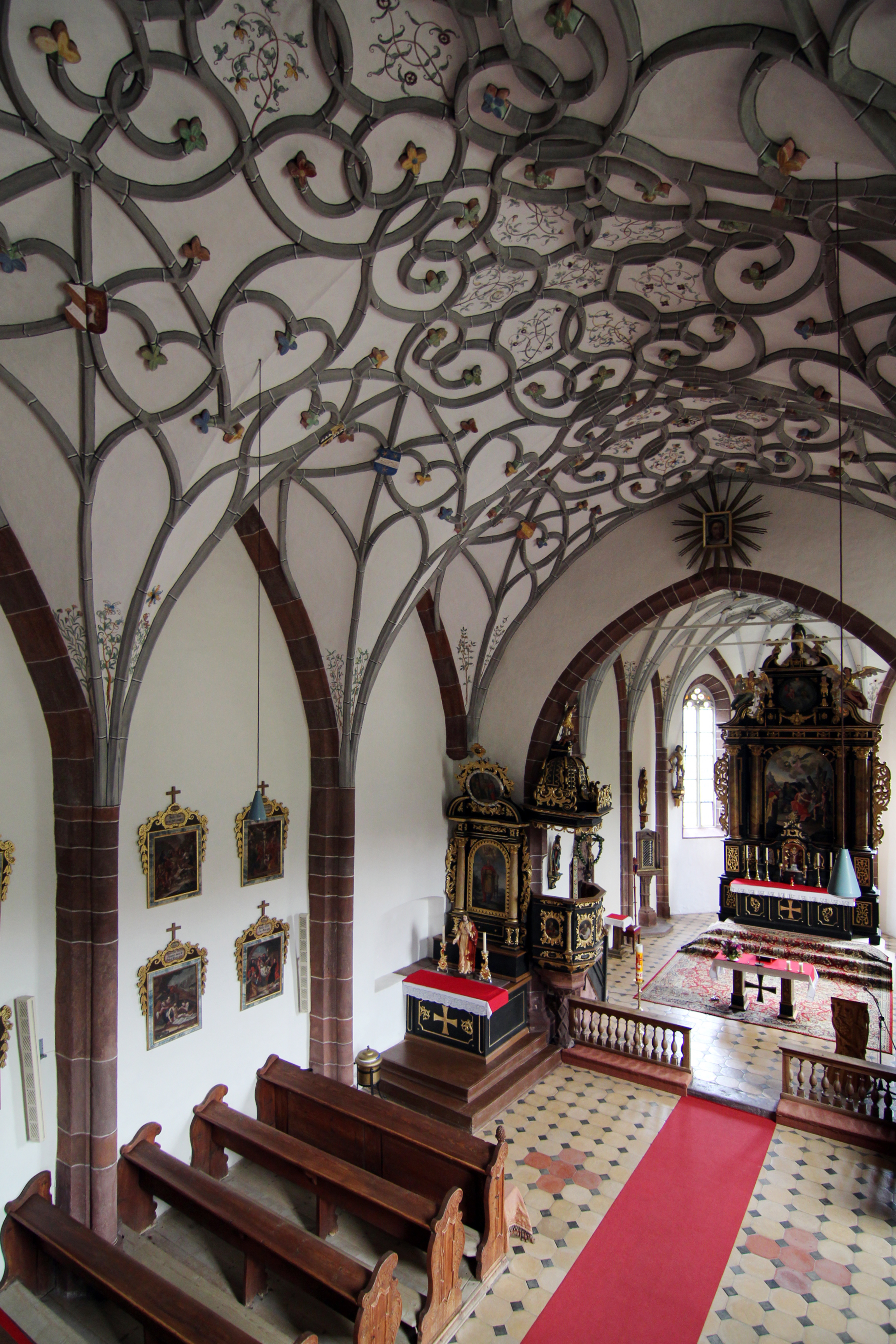 Kath. Filialkirche hl. Andreas von Bartmä Firtaler